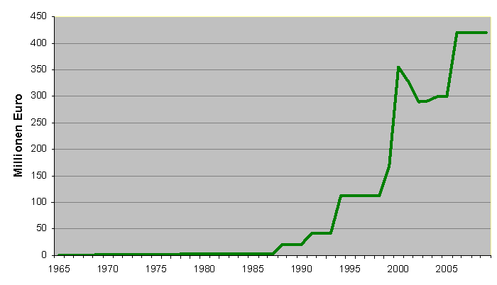 Entwicklung der Fernsehgelder der Fußball-Bundesliga